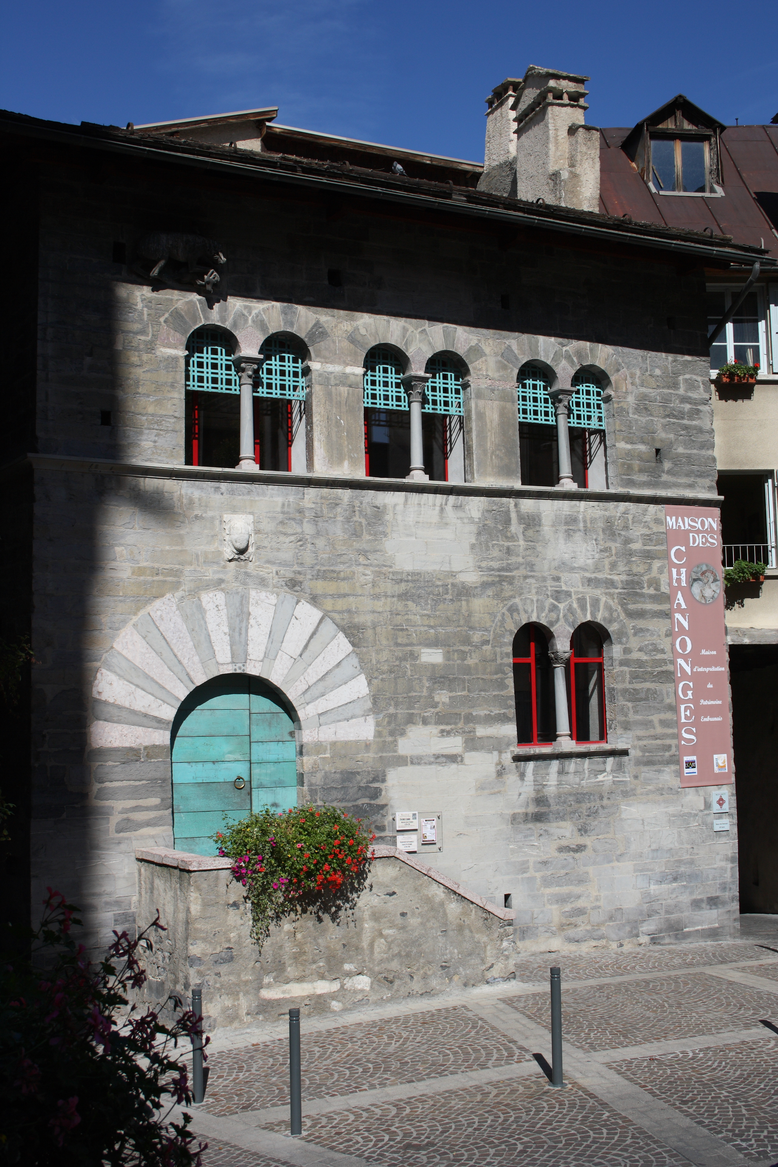 Maison des Chanonges in Embrun, einer Gemeinde im Département Hautes-Alpes in der französischen Region Provence-Alpes-Côte d'Azur, romanisches Haus aus dem 13. Jahrhundert